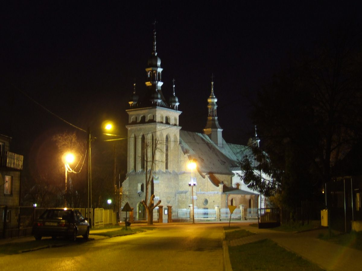 Zwoleń, Poland, kościół pw. Podwyższenia Krzyża Świętego